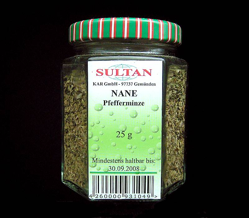 Mentha x piperita freeze dried